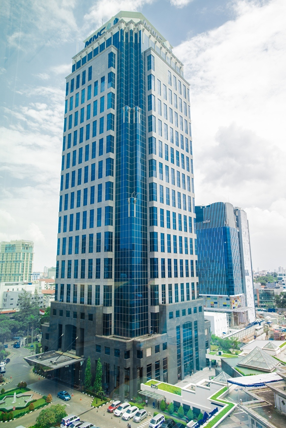 Gedung MNC Tower di Jakarta